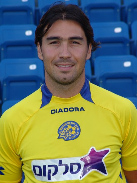 מילאן מרטינוביץ', שחקן מכבי תל אביב (Milan Martinovich of Maccabi Tel Aviv)